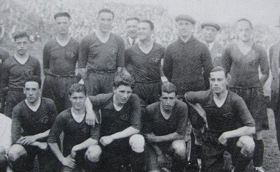 Le CA Paris finaliste de la Coupe de France de football 1927-1928. Second rang : Jean Laurent, Jean Gauteroux, Jean Fidon, René Quentier, Armand Blanc, Albert Ottavis. Premier rang : Georges Ouvray, Lucien Laurent, Pierre Bertrand, Marcel Langiller, Roland Mahieu.